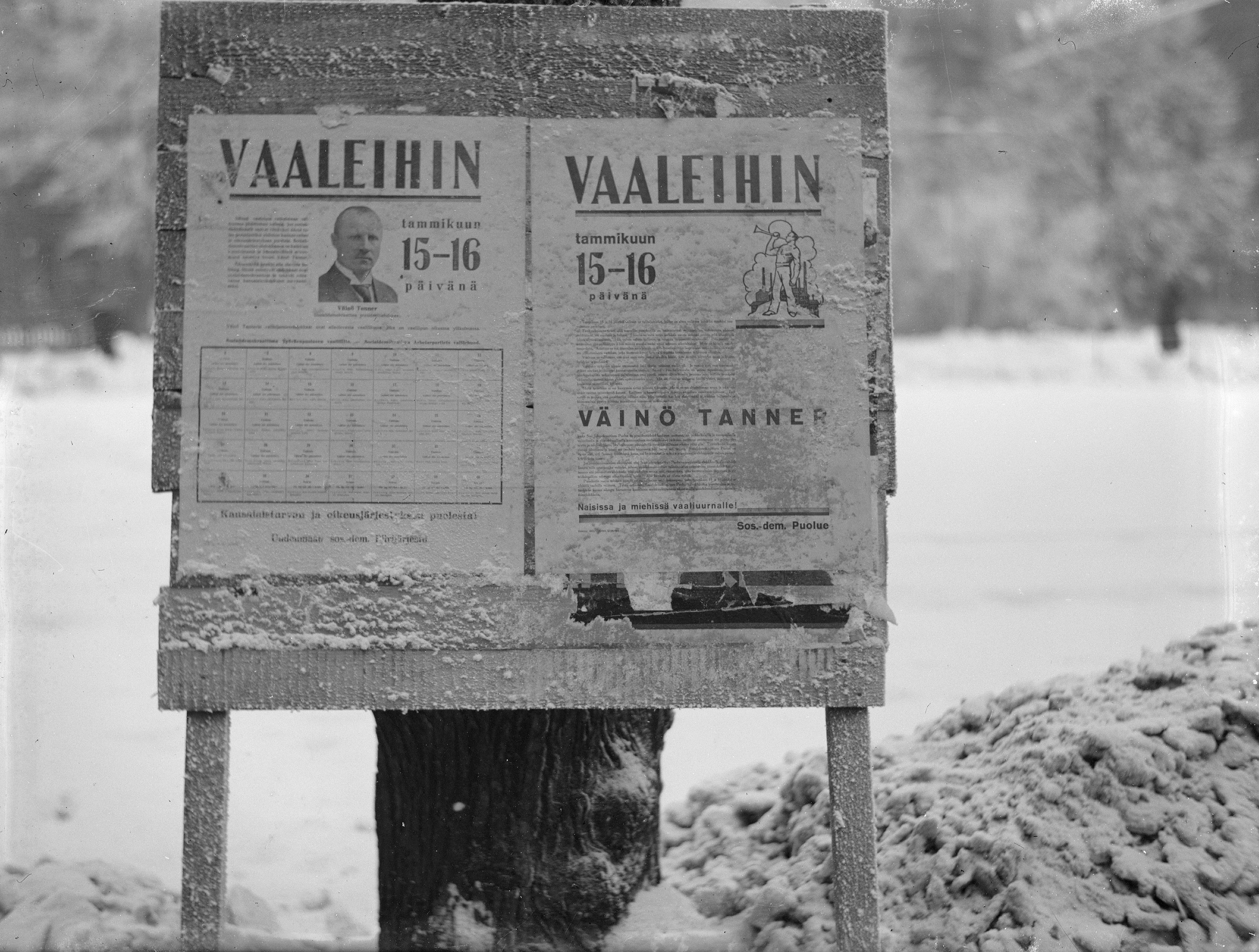 Presidentin valitsijamiesvaalit 15.-16.1.1931, Suomen Sosialidemokraattisen puolueen vaalimainoksia.